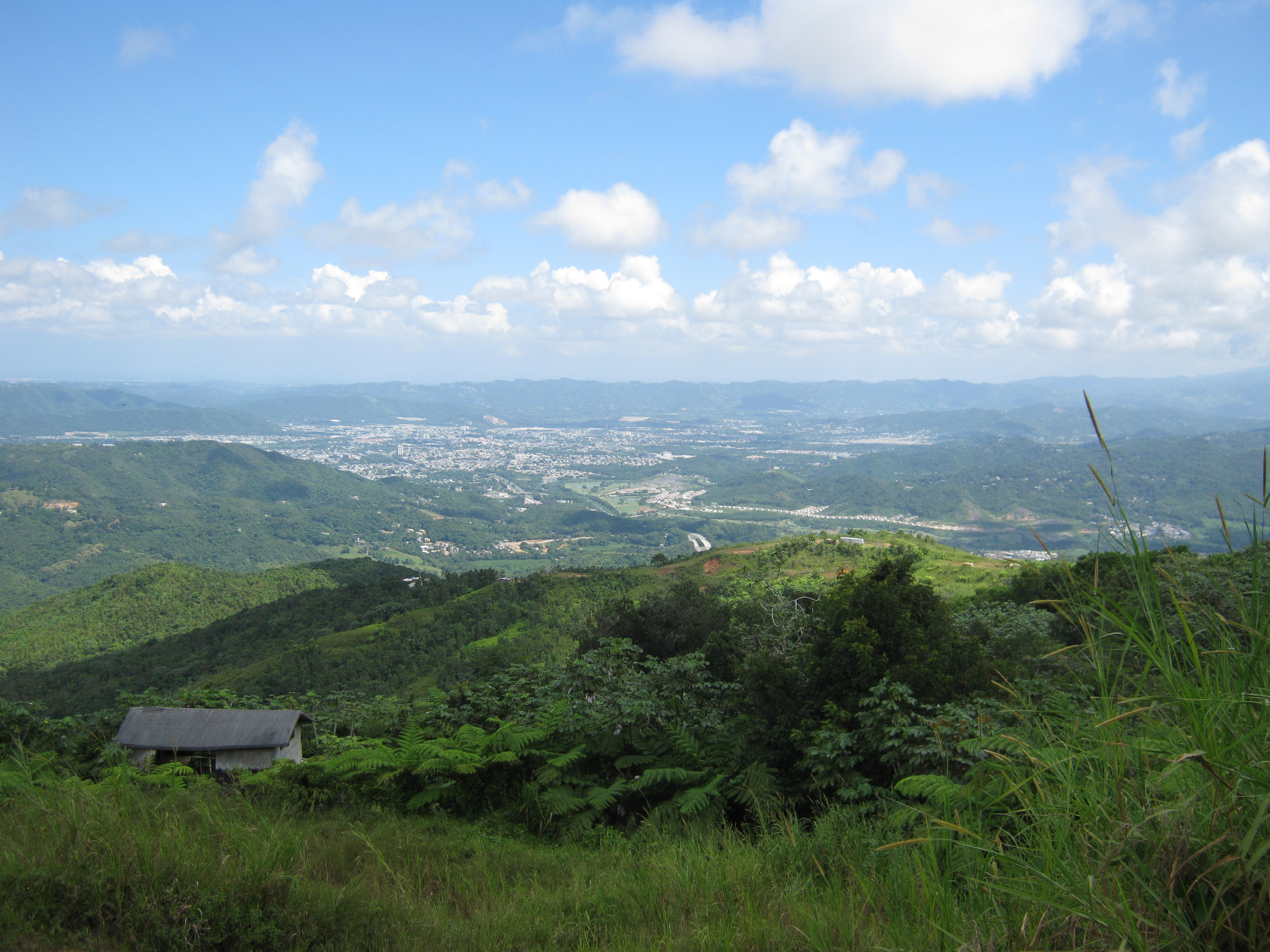 Vista del area de Caguas desde el cerro las piñas